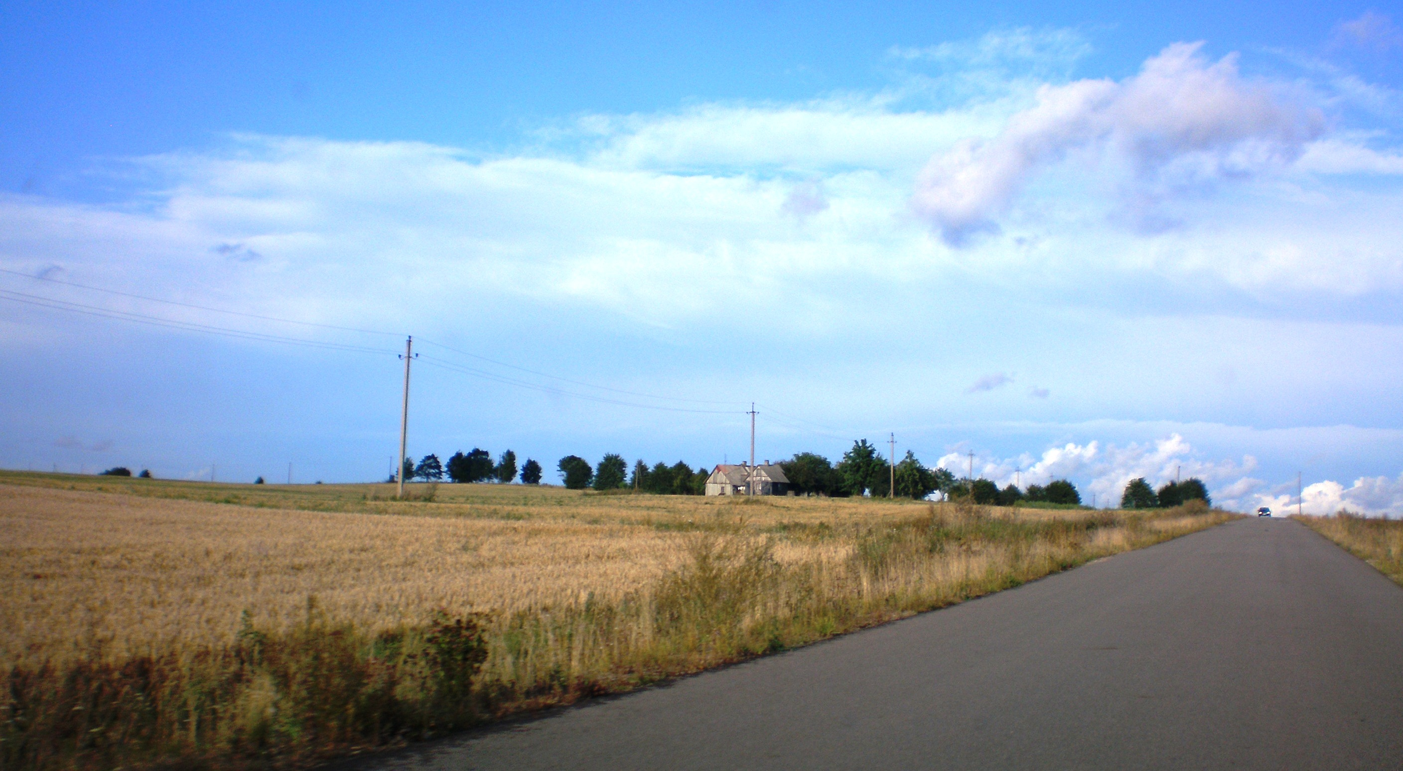 Mąstautai, Kėdainių raj., Lietuva